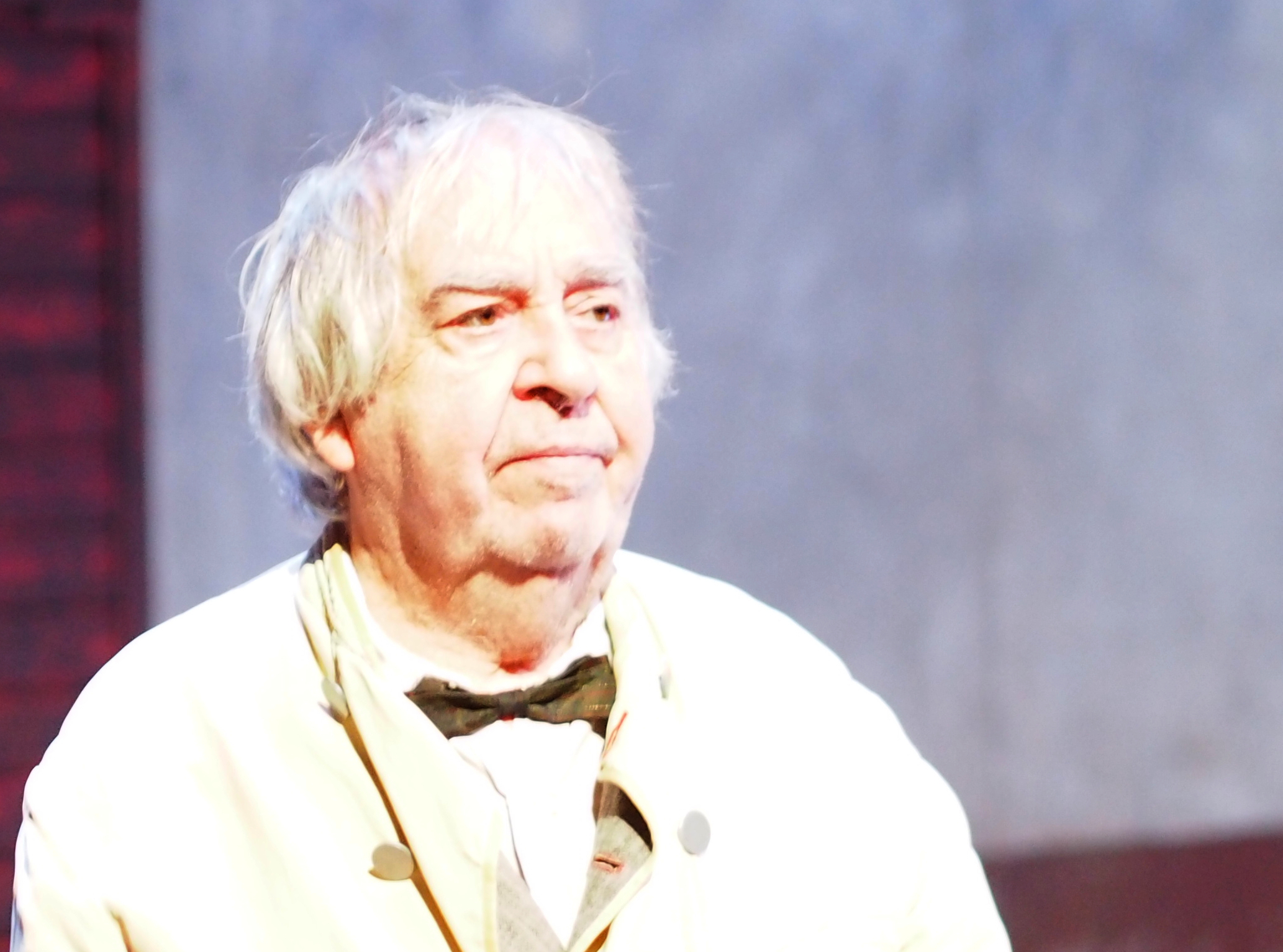 Le comédien français Claude Evrard, en novembre 2013, aux Ateliers Berthier (salle annexe du théâtre de l'Odéon) à Paris (France), au salut, à la fin d'une représentation de La Bonne Âme du Se-Tchouan de Bertolt Brecht, dans la mise en scène de Jean Bellorini.